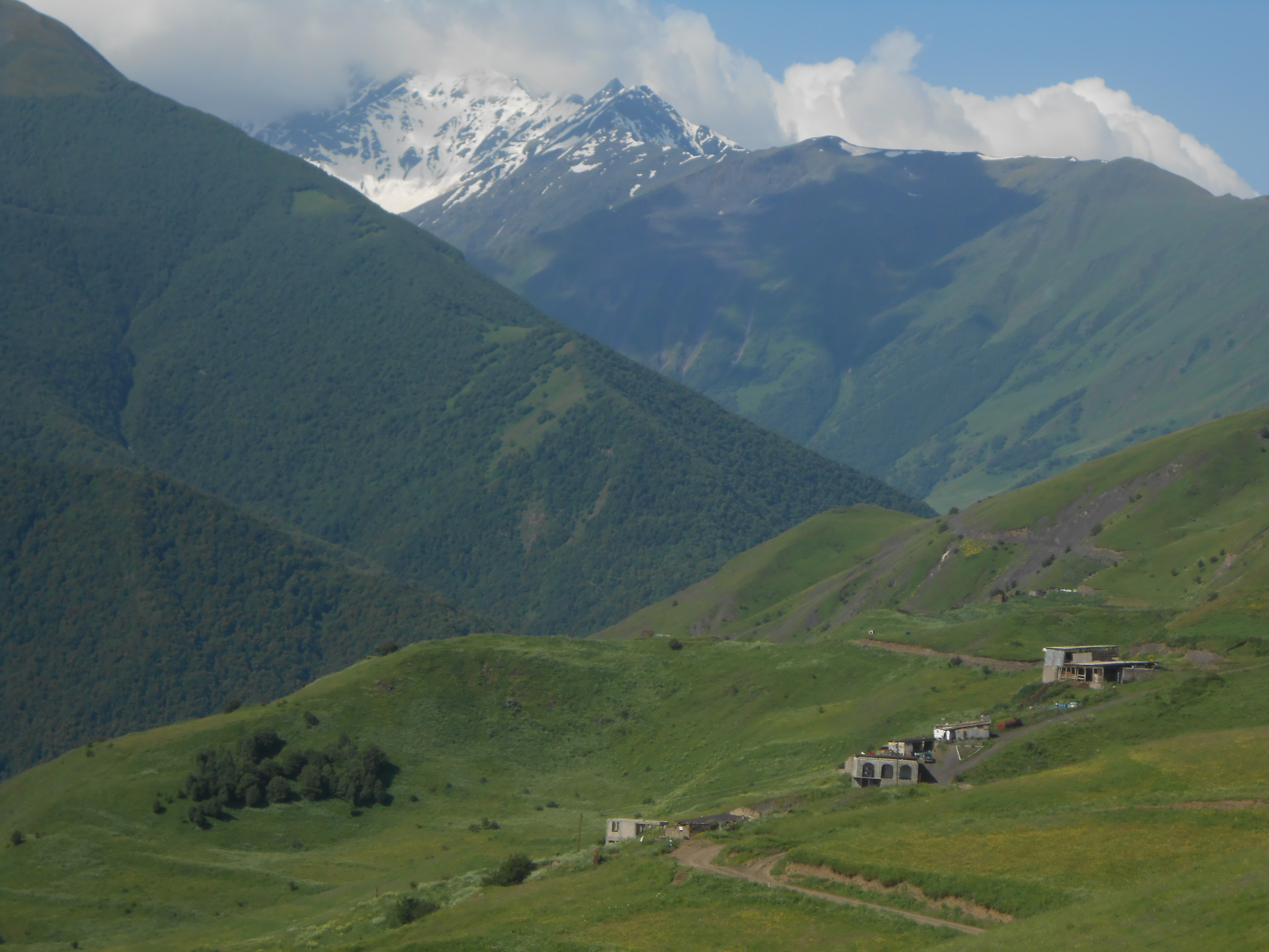 Село Шарой, респ. Чечня